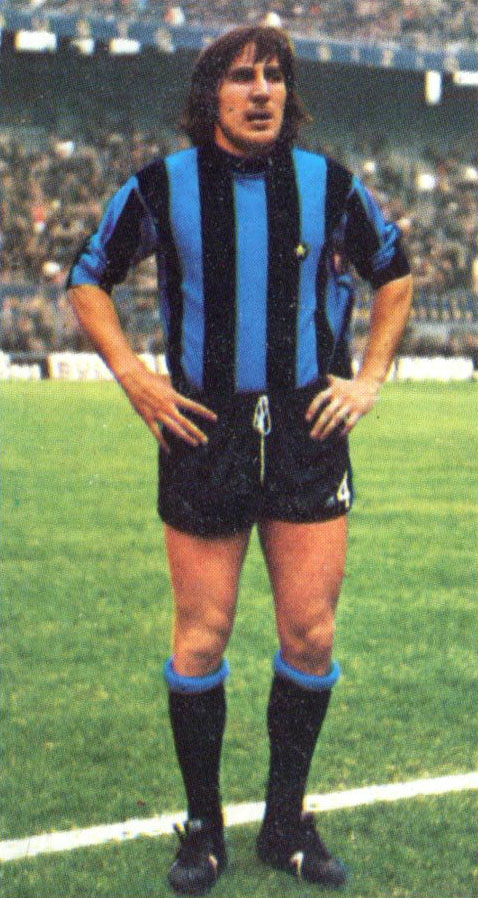 Il calciatore italiano Adriano Fedele all'Inter all'inizio della stagione 1974-75.